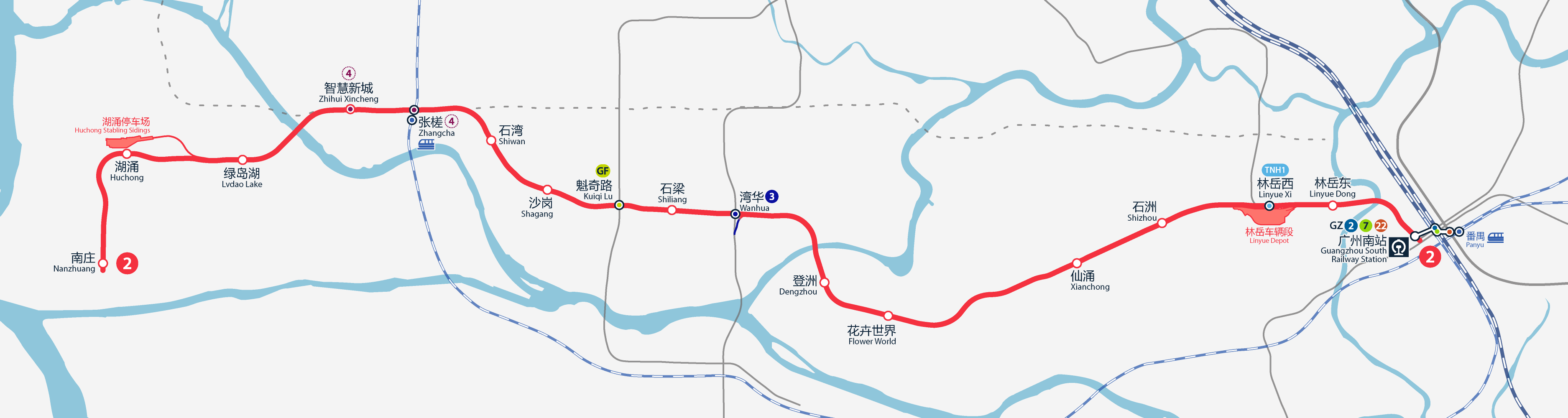 佛山地鐵2號線線路圖，按真實走向比例繪畫